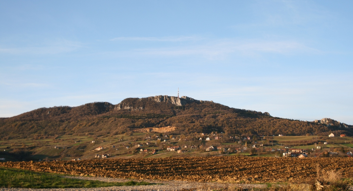 panorama Kalnika